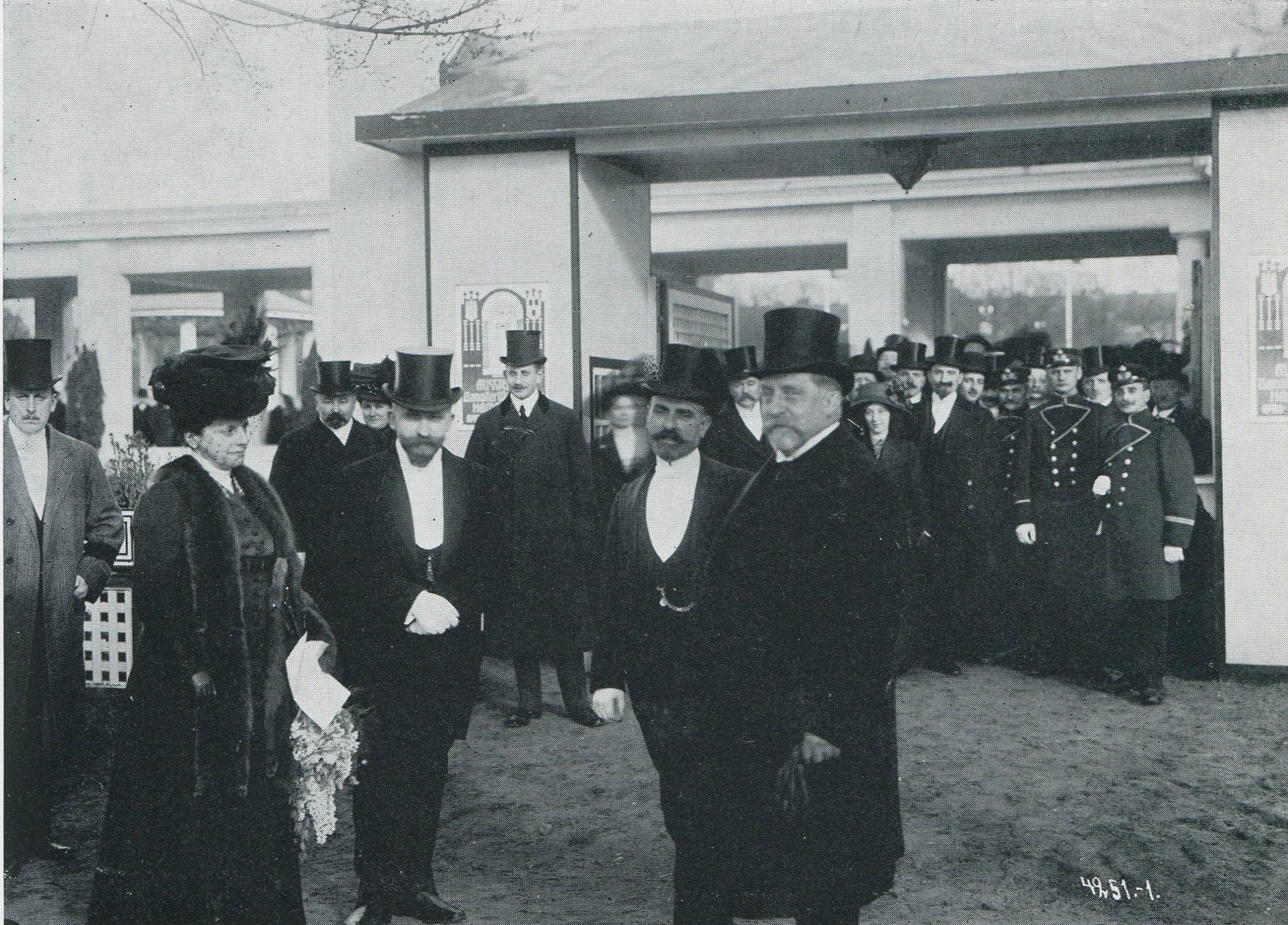 Bürgermeister Max Predöhl und der Obermeister der Malerinnung bei Ausstellungseröffnung Bemalte Wohnräume in Hamburg